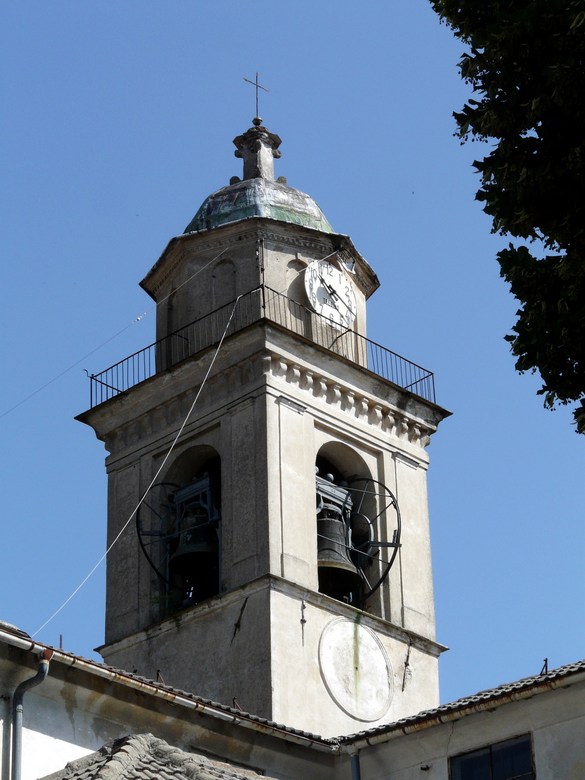 Il campanile della chiesa di Santa Croce, Crocefieschi, Liguria, Italia